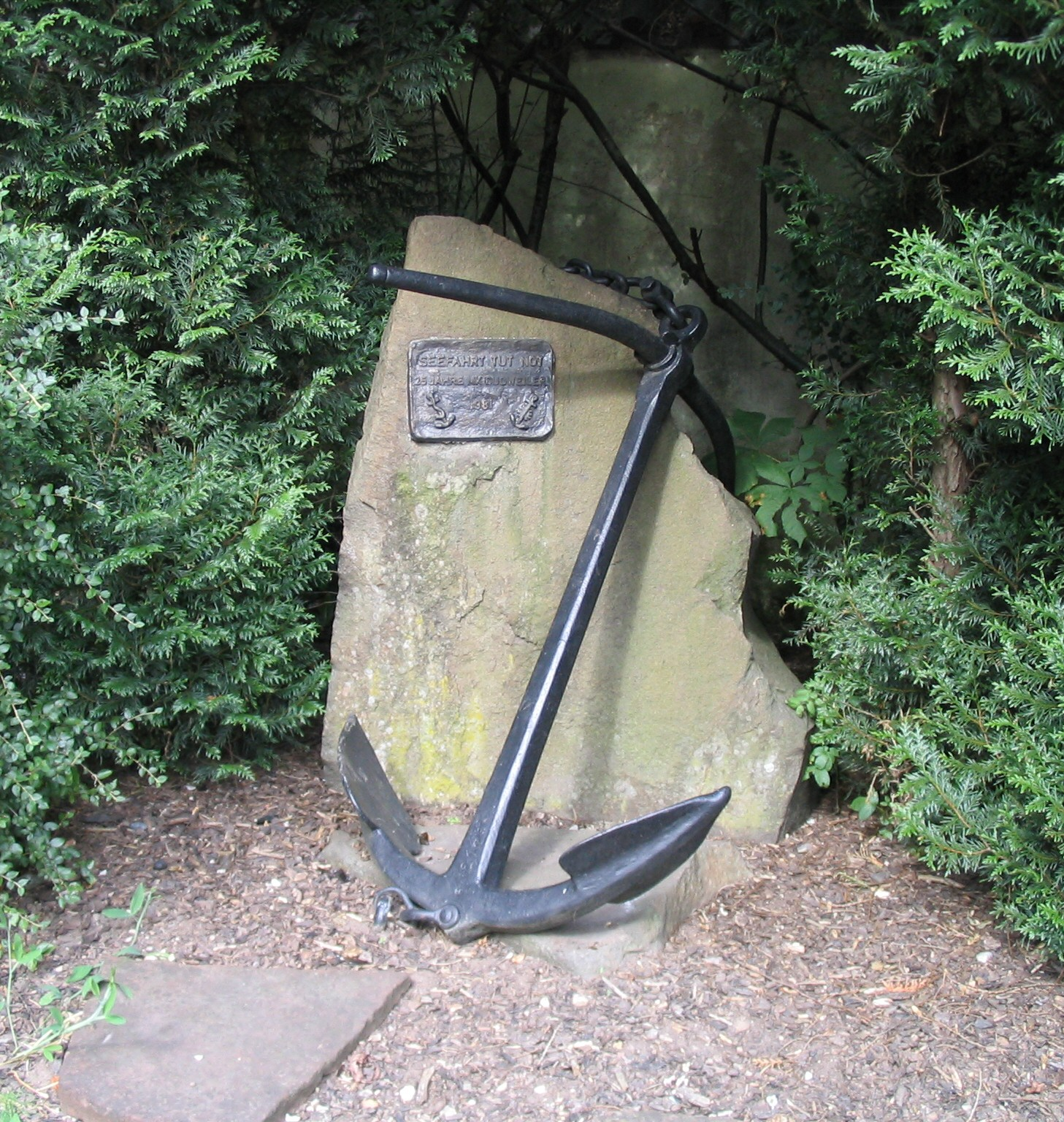 Beschreibung: Denkmal aus dem Jahr 1981 zum 25-jährigen Bestehen der Marinekameradschaft Dudweiler (Saarbrücken/Deutschland). Photographer: kh80 Date: 2005-07-28 License: GFDL and cc-by-sa/2.0/de